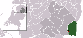 Locatie van Nieuw-Amsterdam aangegeven binnen de gemeente Emmen.